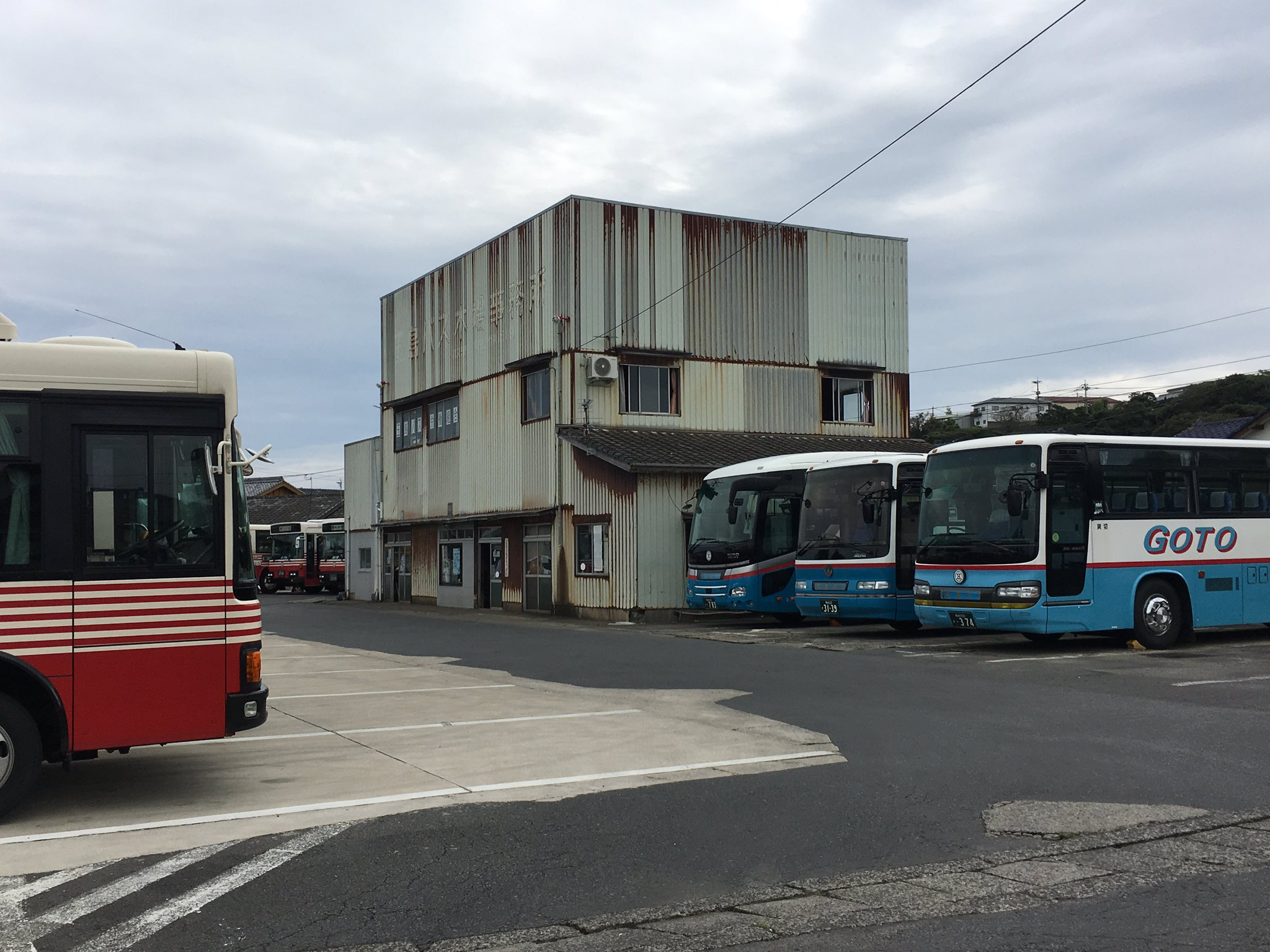 五島自動車の五島バス・木場営業所入り口より社屋、駐車場を撮影。